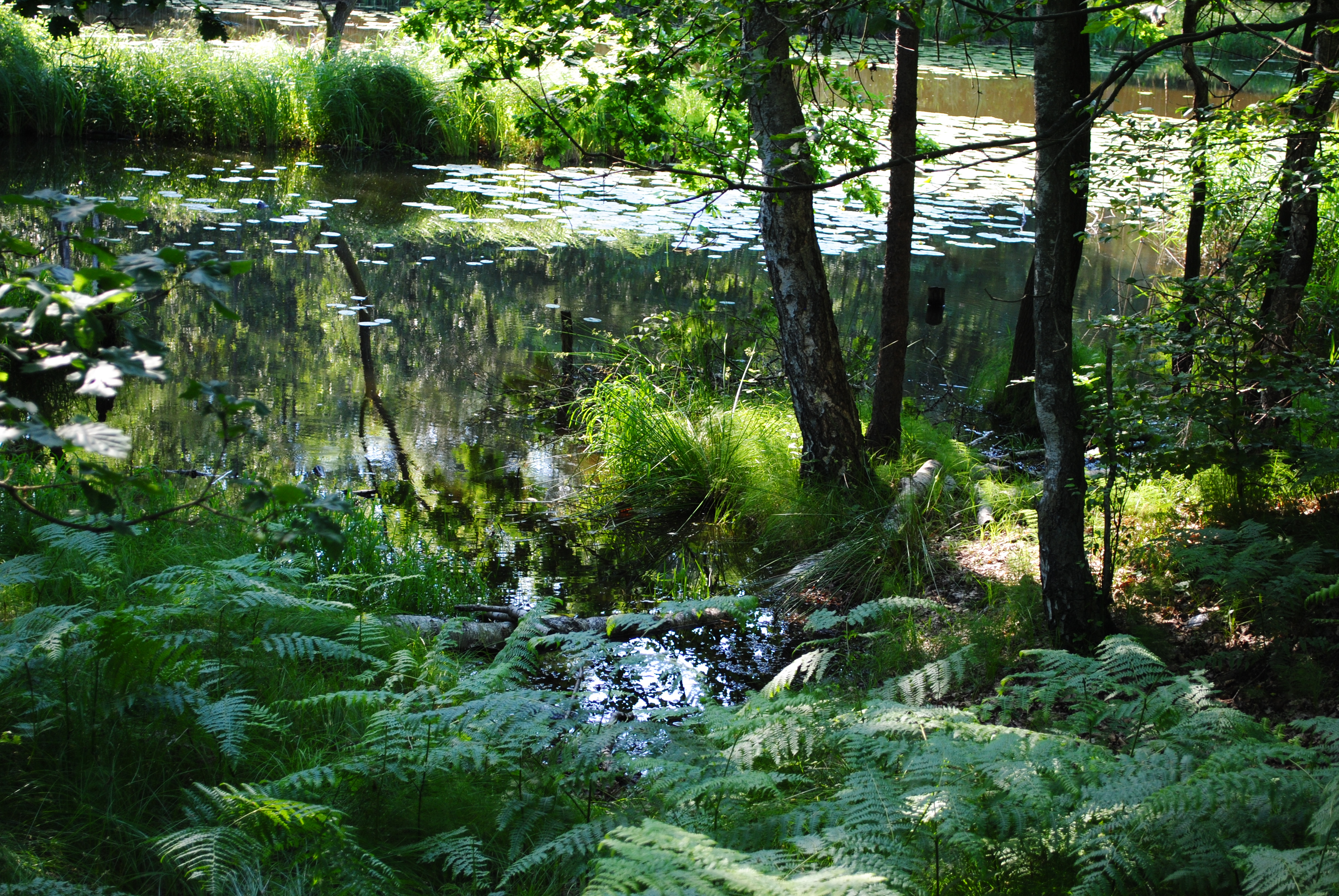 Katowice-Giszowiec. Staw Janina